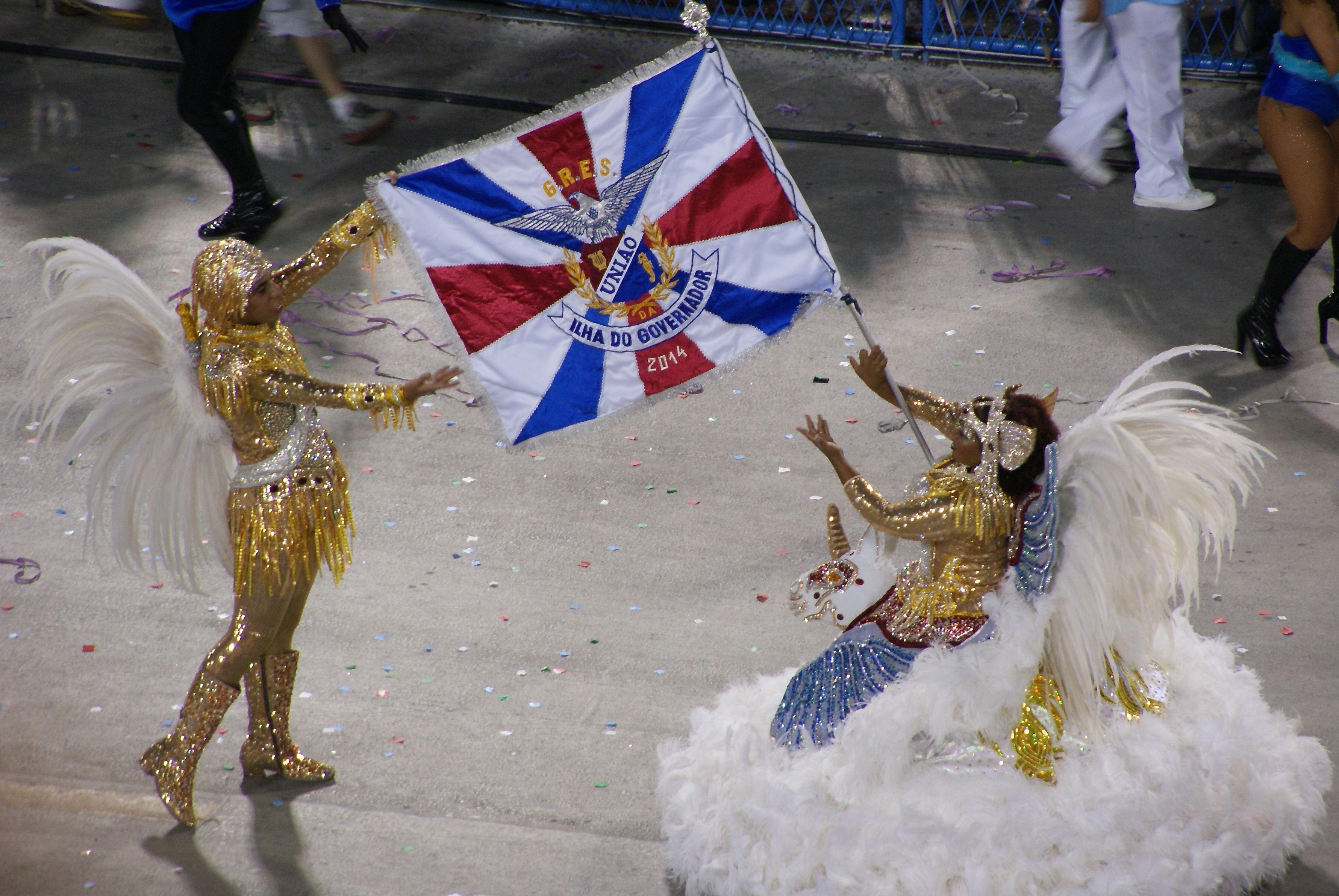 Carnival of Rio de Janeiro 2014